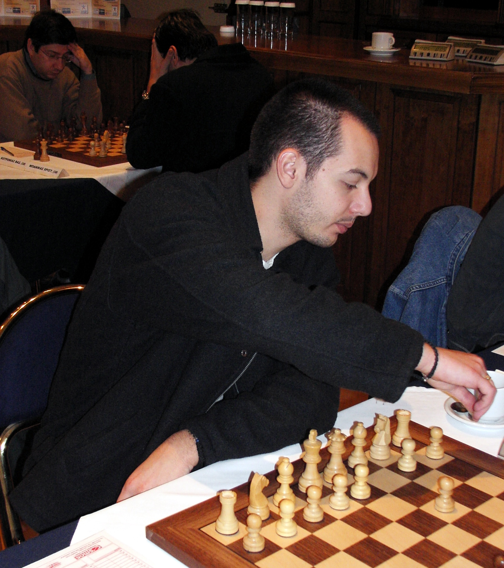 GM Dimitrios Mastrovasilis, Greece